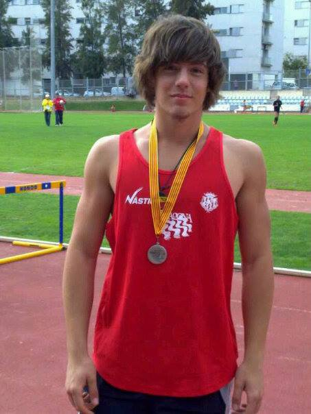 Daniel Collar en 2013